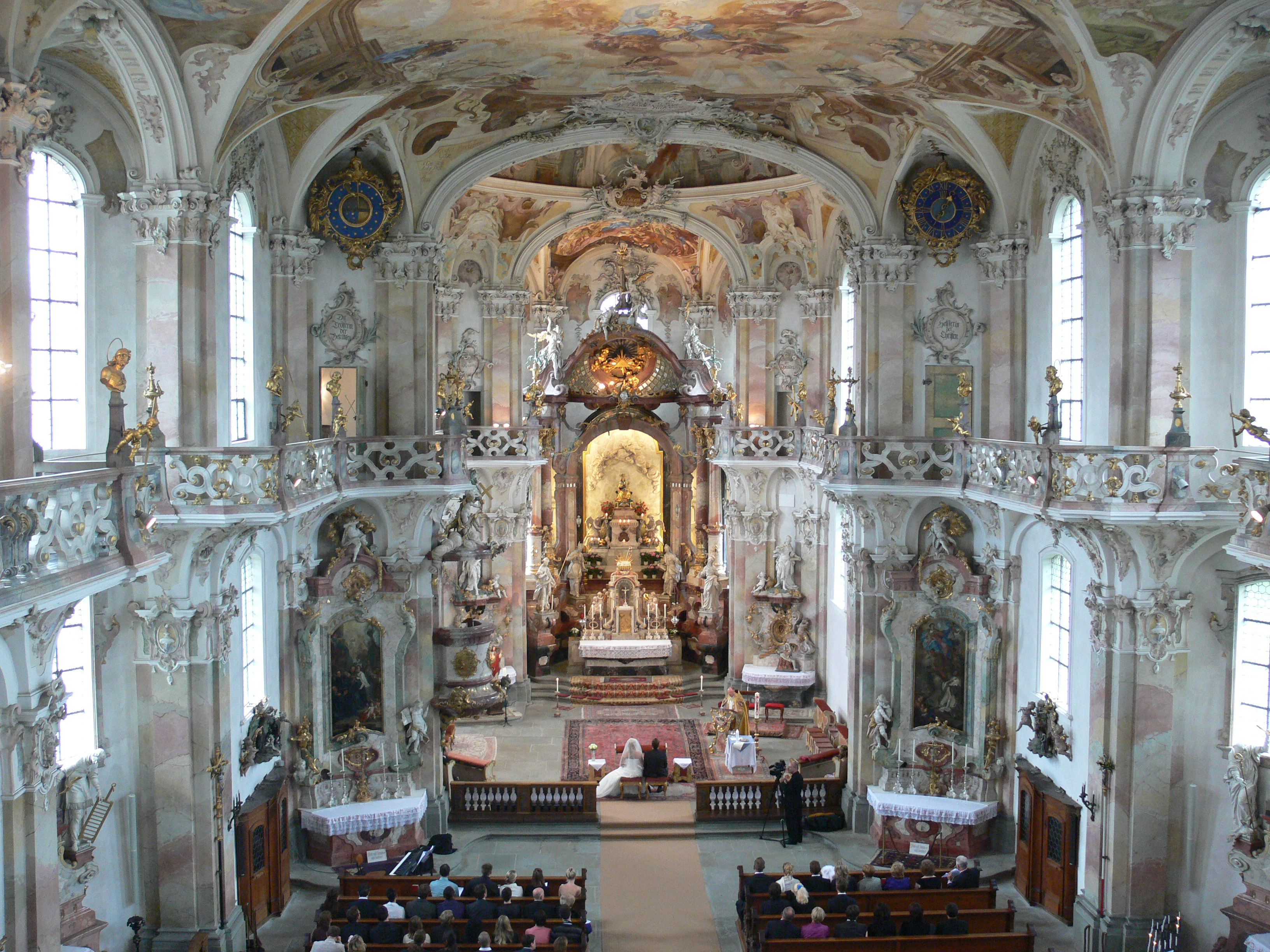 Wallfahrtskirche Birnau, Blick von der Empore